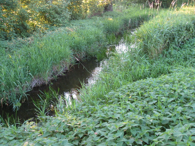 Vilkauja prie Vilkaviškio